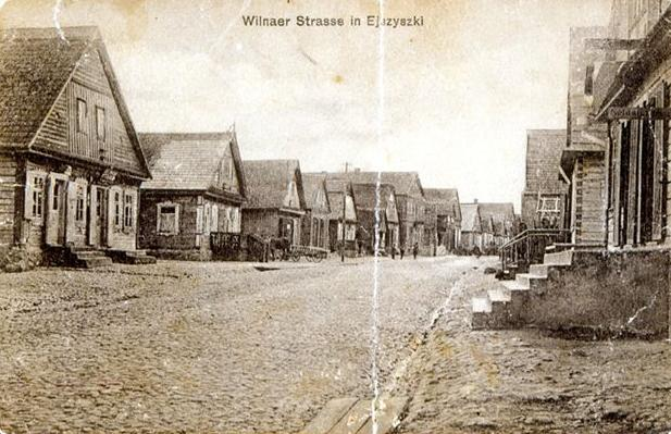 Wilnaerstrasse (Vilna-Street), Eišiškės